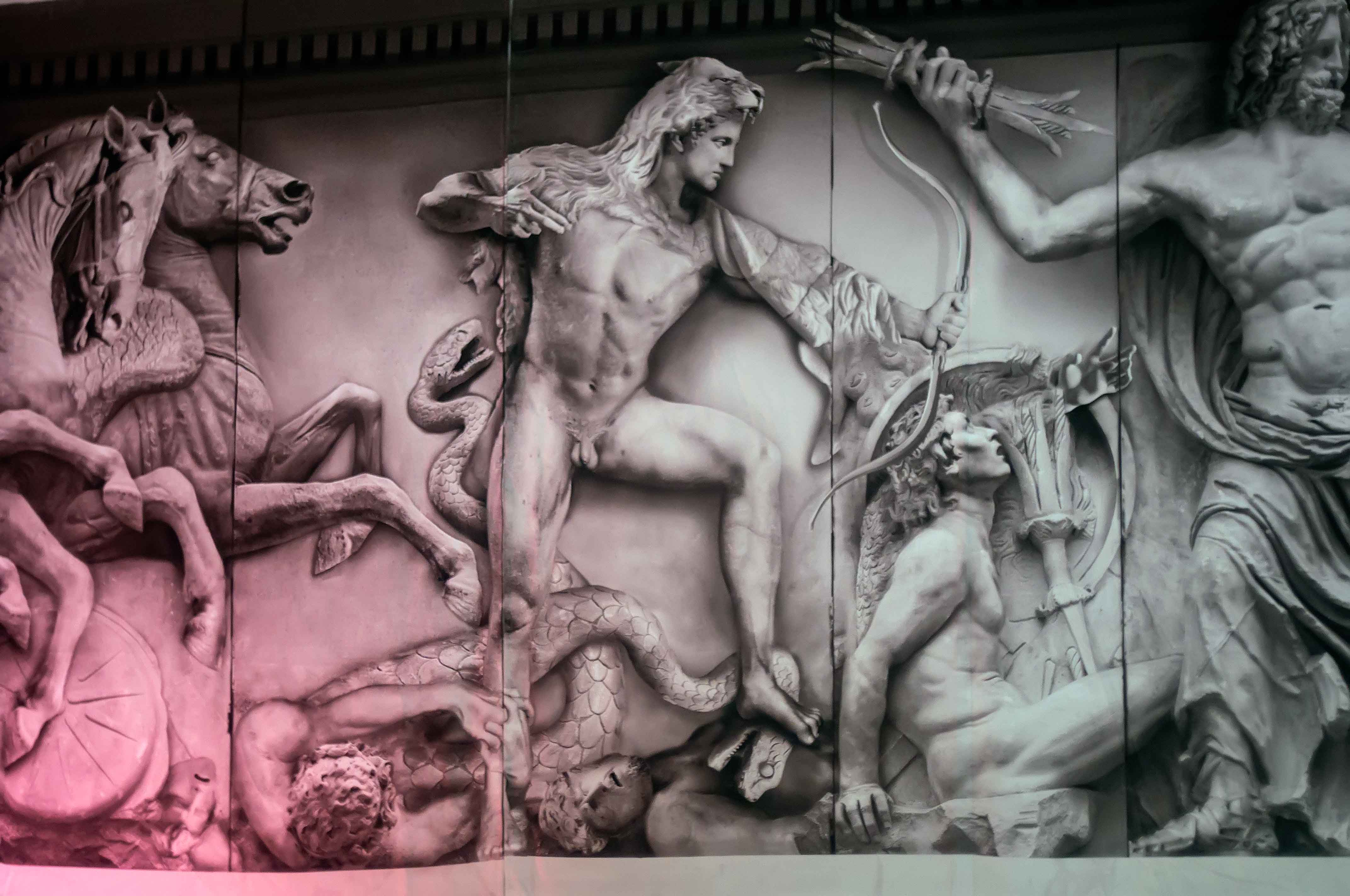 ЛИФФТ 2018